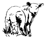 Skalärmusikens officiella maskot, fettsvansfåret, orkesterns egen design, kopierad med orkesterns uttryckliga medgivande